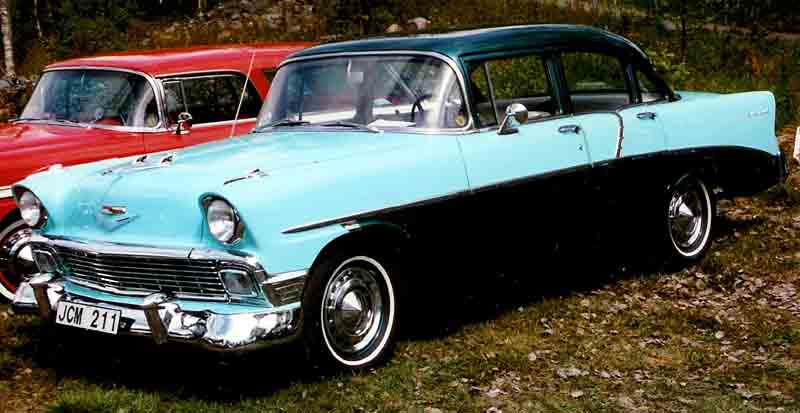 1956 Chevrolet Two-Ten Series 2100B, Model 2103 4-Door Sedan